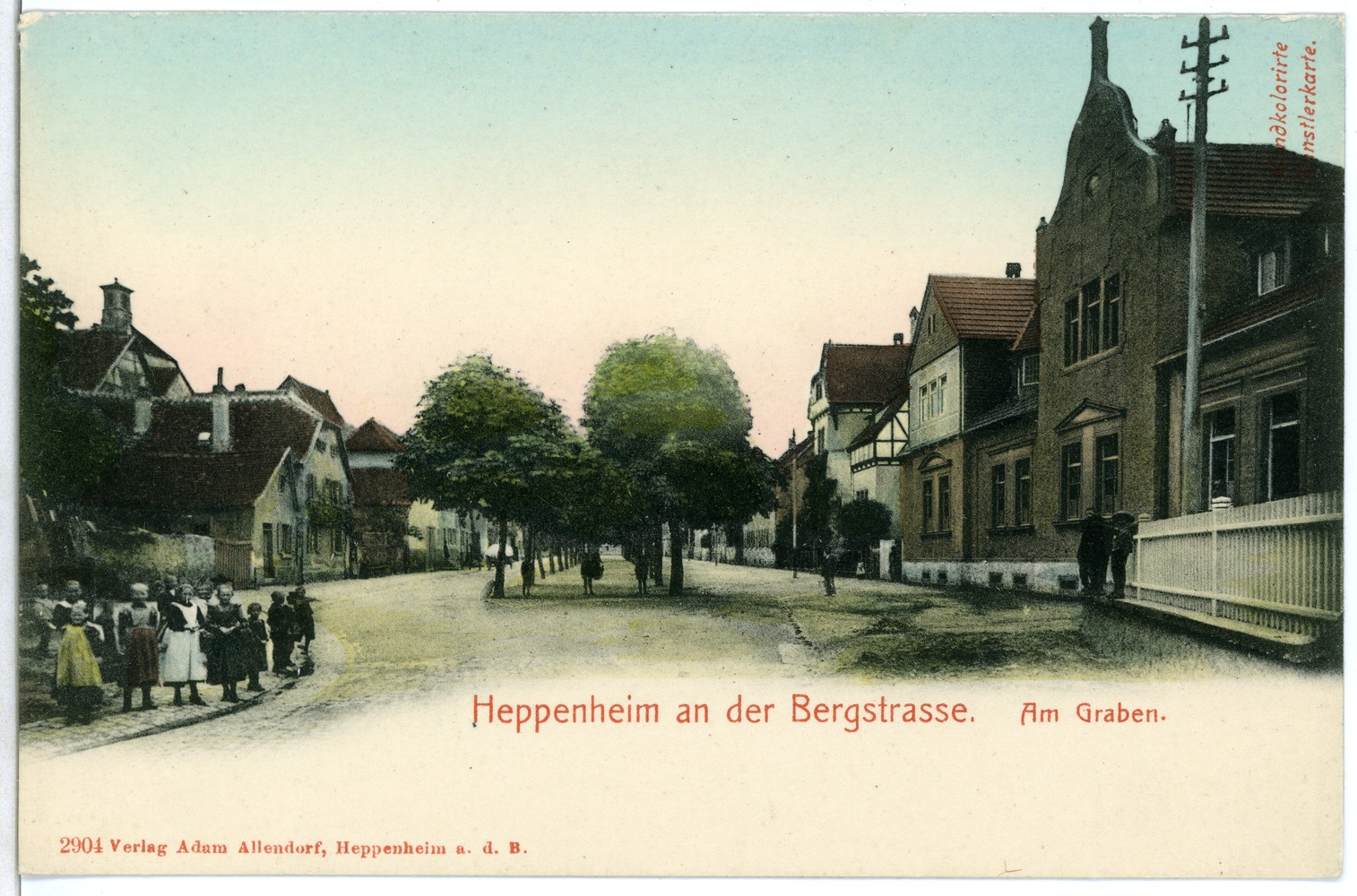 Heppenheim; Heppenheim an der Bergstraße, Am Graben This postcard is from publisher Brück & Sohn in Meißen ( postcard has a unique number 02904 and is available in a higher resolution at the publisher. This images was uploaded in a cooperation project between Wikipedians and the publisher.